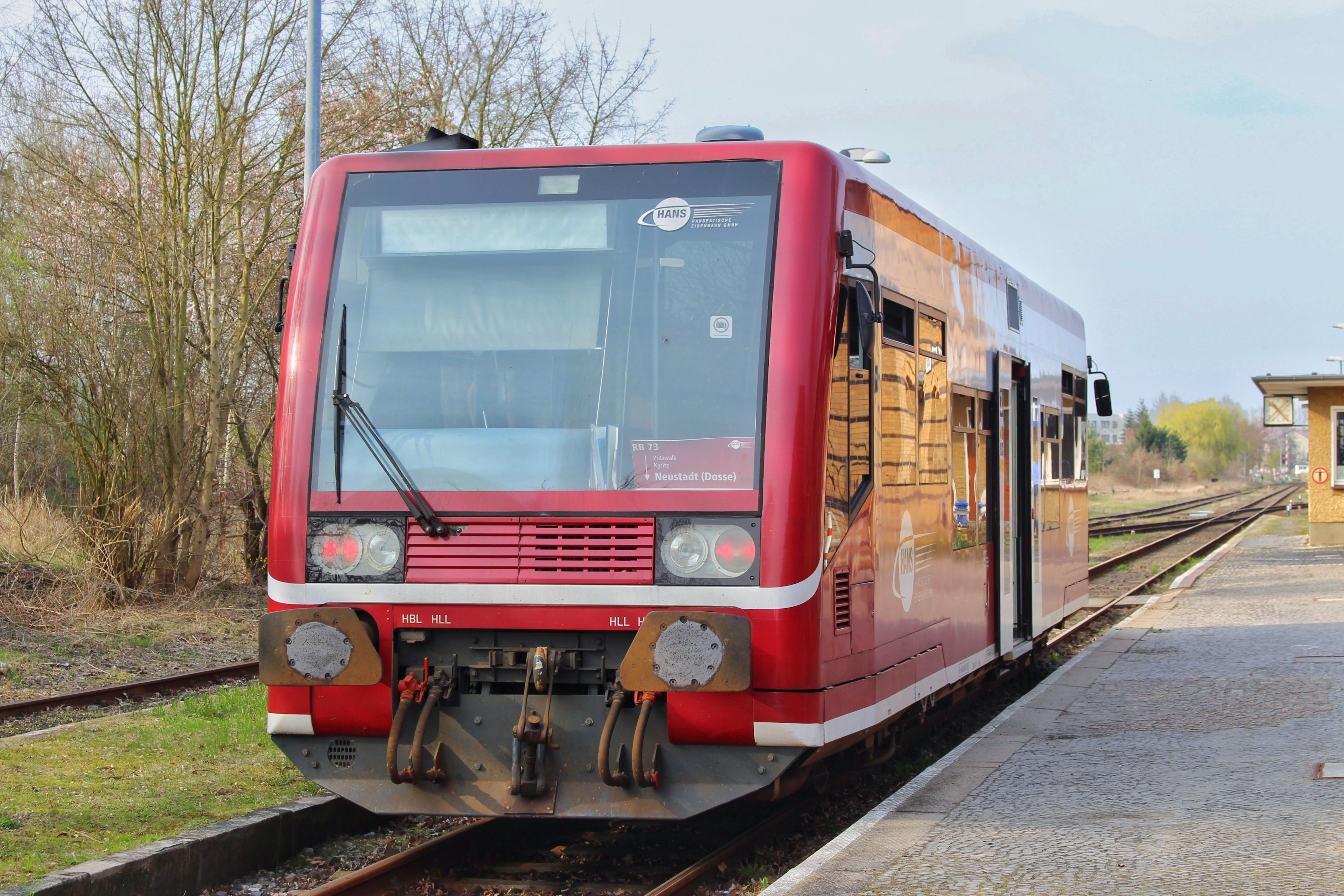 LVT/S 504 007 der HANSeatischen Eisenbahn GmbH am 1.4.2017 im Bahnhof Kyritz